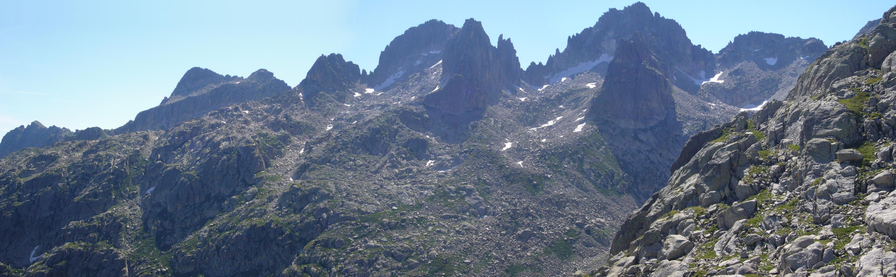 Punta d'Harlé, el Pa de Sucre i Tumeneia, vistos des de la Colhada de Lac de Mar; Naut Aran, Vall d'Aran, Catalunya